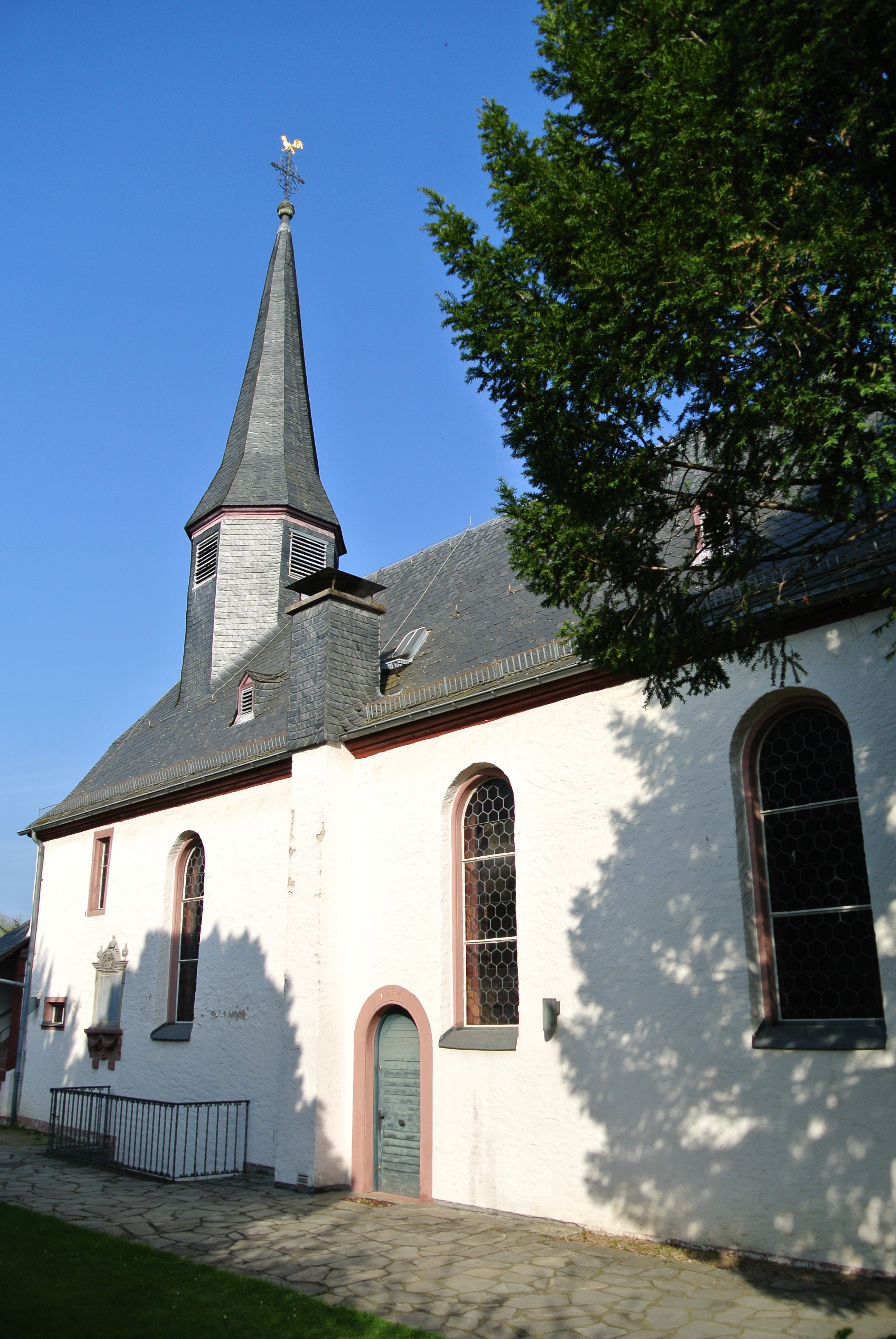 Evangelische Dorfkirche in Frankfurt-Unterliederbach, Heugasse 1; Bauzeit 12. Jahrhundert, 1716; barocke Saalkirche von Daniel Keyser; Baudenkmal; Südfassade